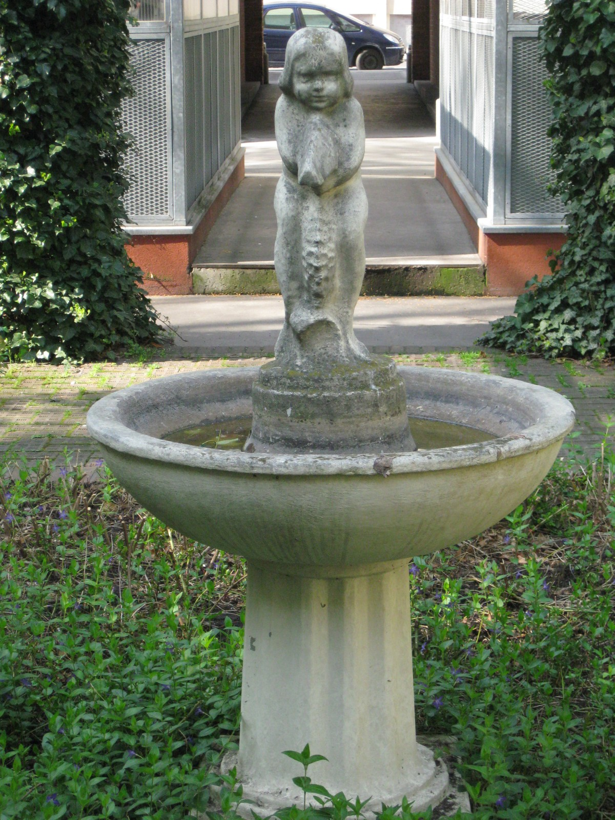 Brunnenplastik Nixchen von Anton Endsdorfer aus dem Jahr 1926 im Josef-Scheu-Hof.